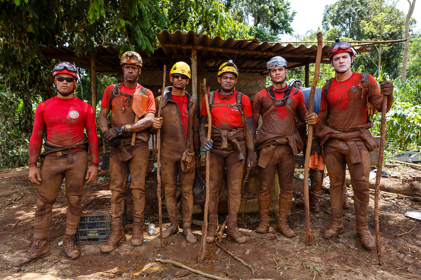 Wiki Expedição Brumadinho - Fevereiro de 2019 - Brumadinho - MG - Brasil.